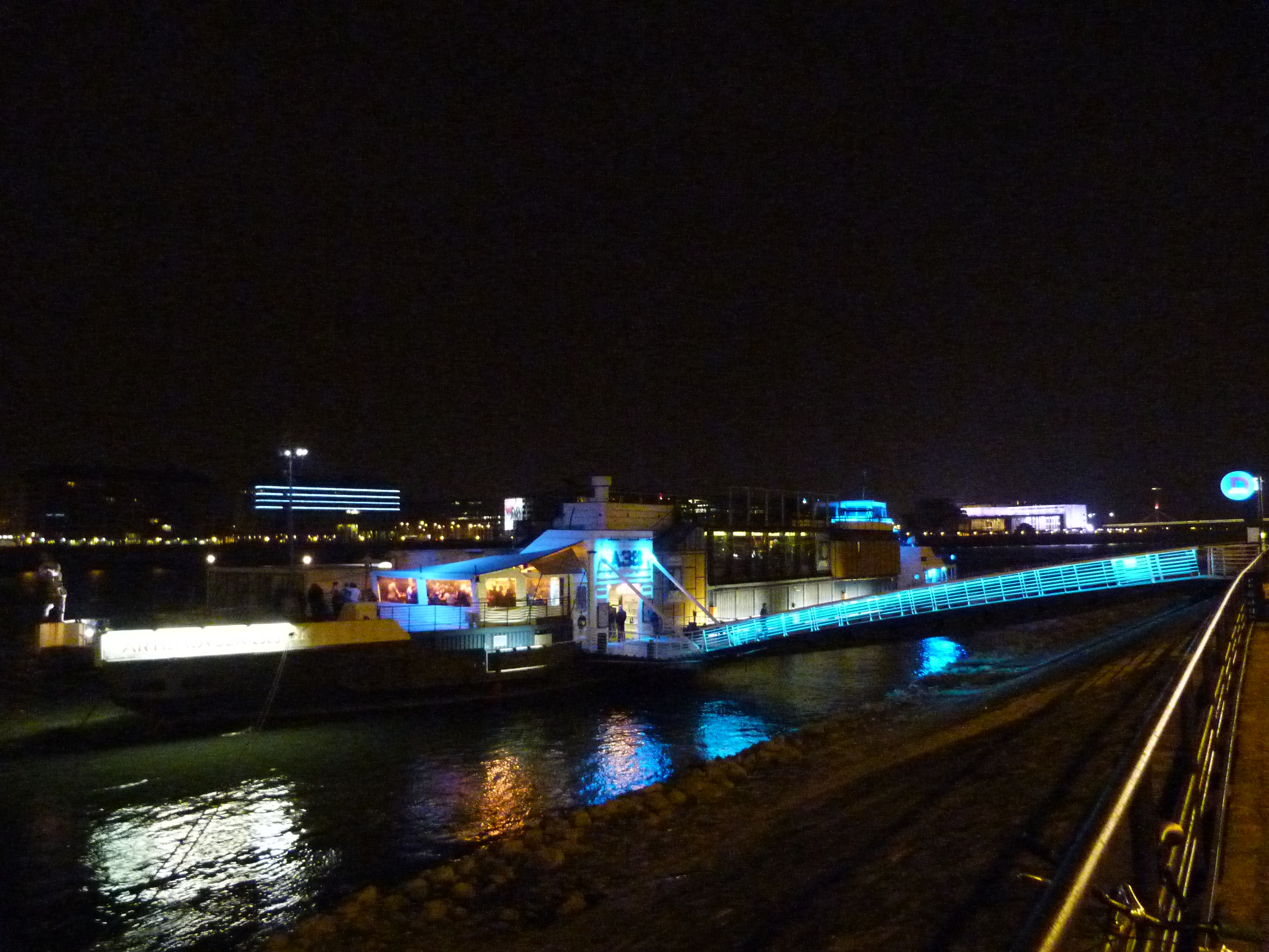 A felvétel 2014. január 1 -én készült hajnalban, az A38 as hajóról. ©© Derzsi Elekes Andor, Budapest, 2013, A kép és filmfelvételek egészben, vagy részletekben másolását, bármilyen úton történő sokszorosítását és felhasználását a szerző ellenérték nélkül, jogutódjaira is kihatóan megengedi. Az engedély kiterjed a kereskedelmi célú hasznosításra is. Kéri azonban nevének feltüntetését a felhasználás során. A Metapolisz sorozat valamennyi képe és filmje Creative Commons alatti valamint kereskedelmi - for profit - célra is felhasználható. Ajánlott hivatkozás: Derzsi Elekes Andor: Metapolisz DVD line